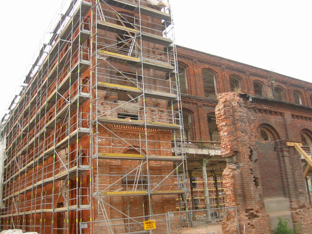 Centrum Manufaktura - budowa